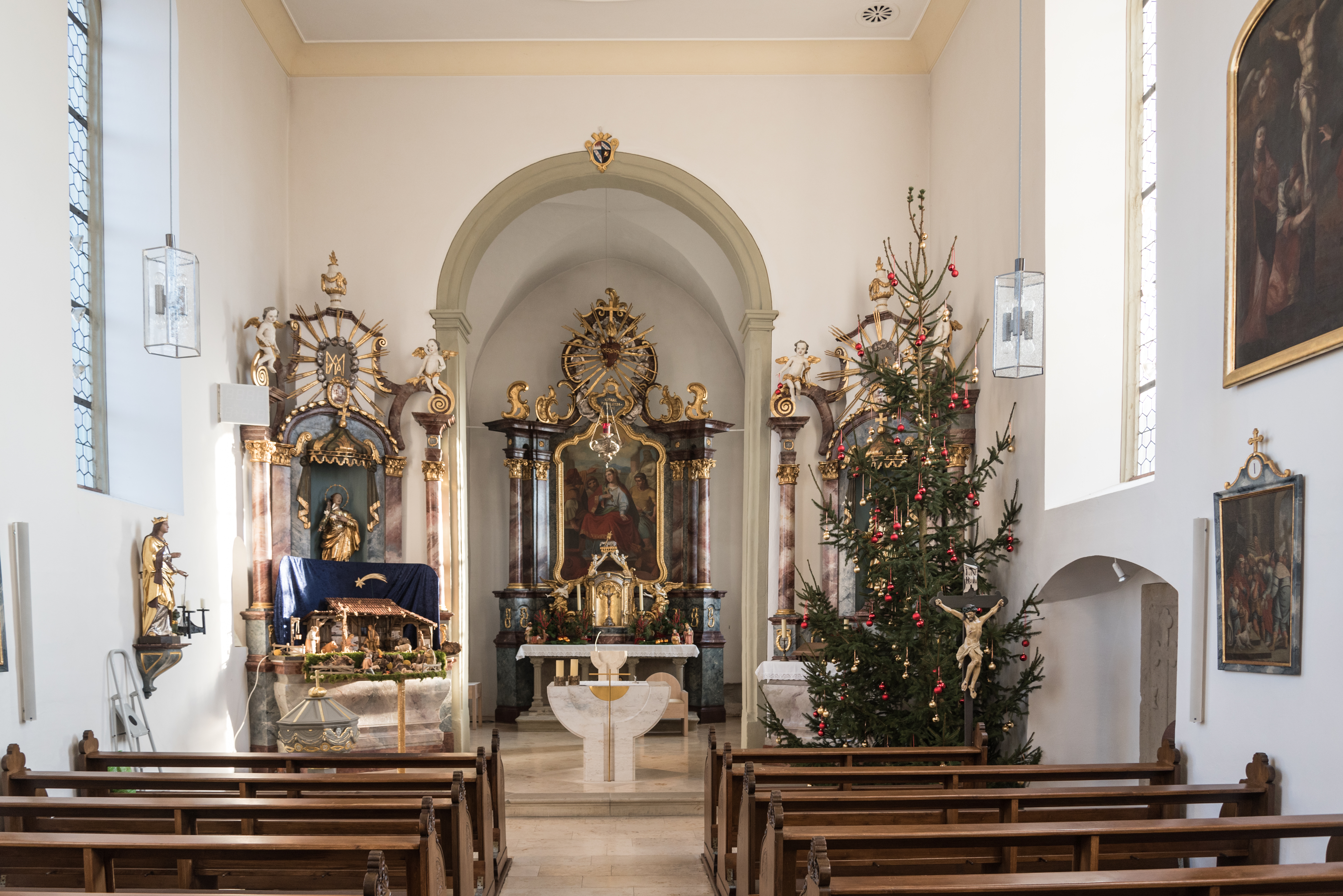 Üchtelhausen, Ebertshausen, Kath. Pfarrkirche St. Margaretha